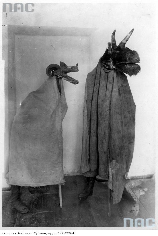 Туронь. Этнографический музей в Кракове, Польша. 1926